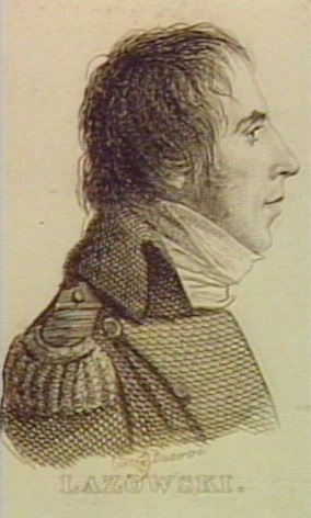 Portrait de Claude François Lazowski